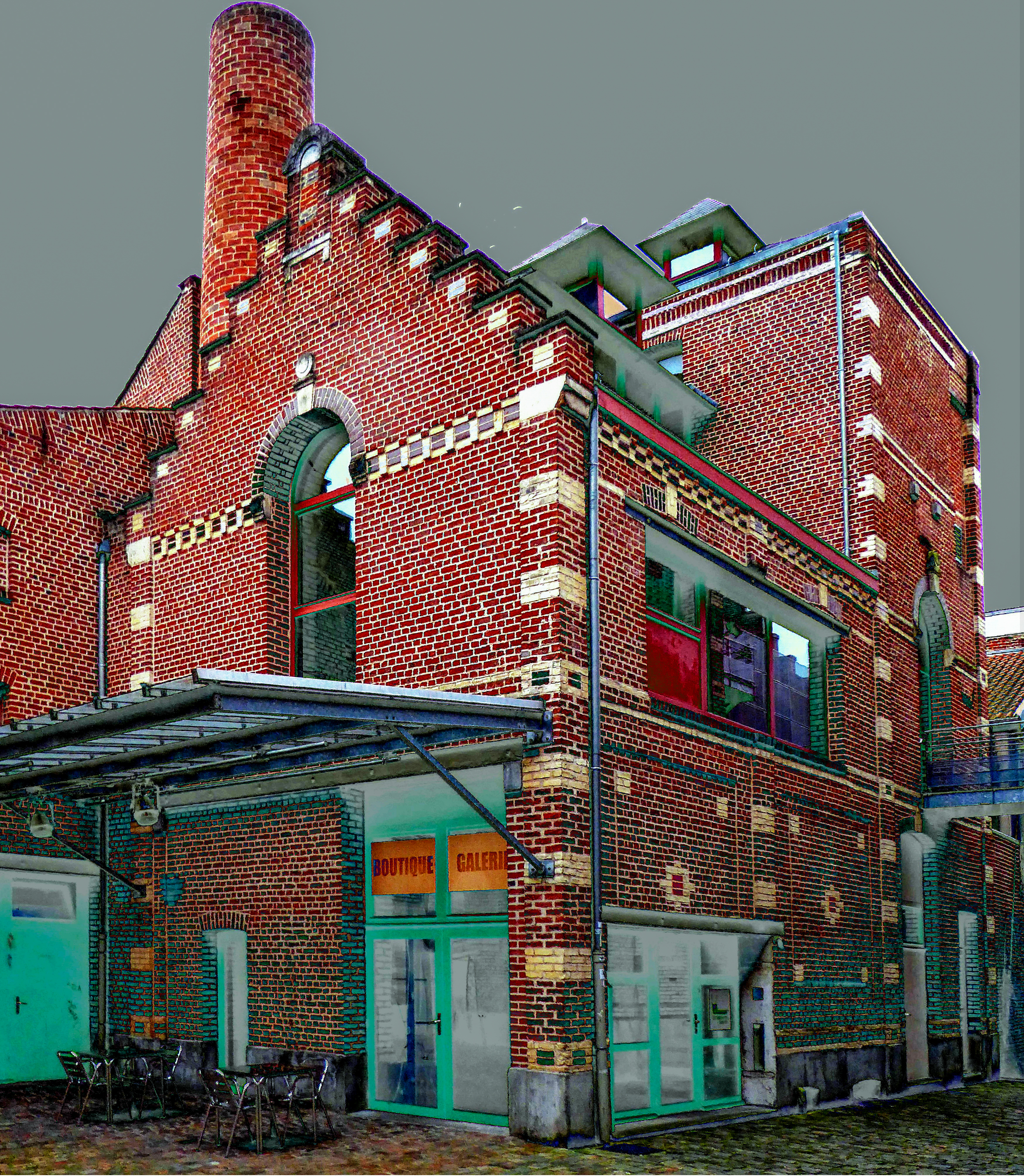 Maison Folie Moulins de Lille Nord .